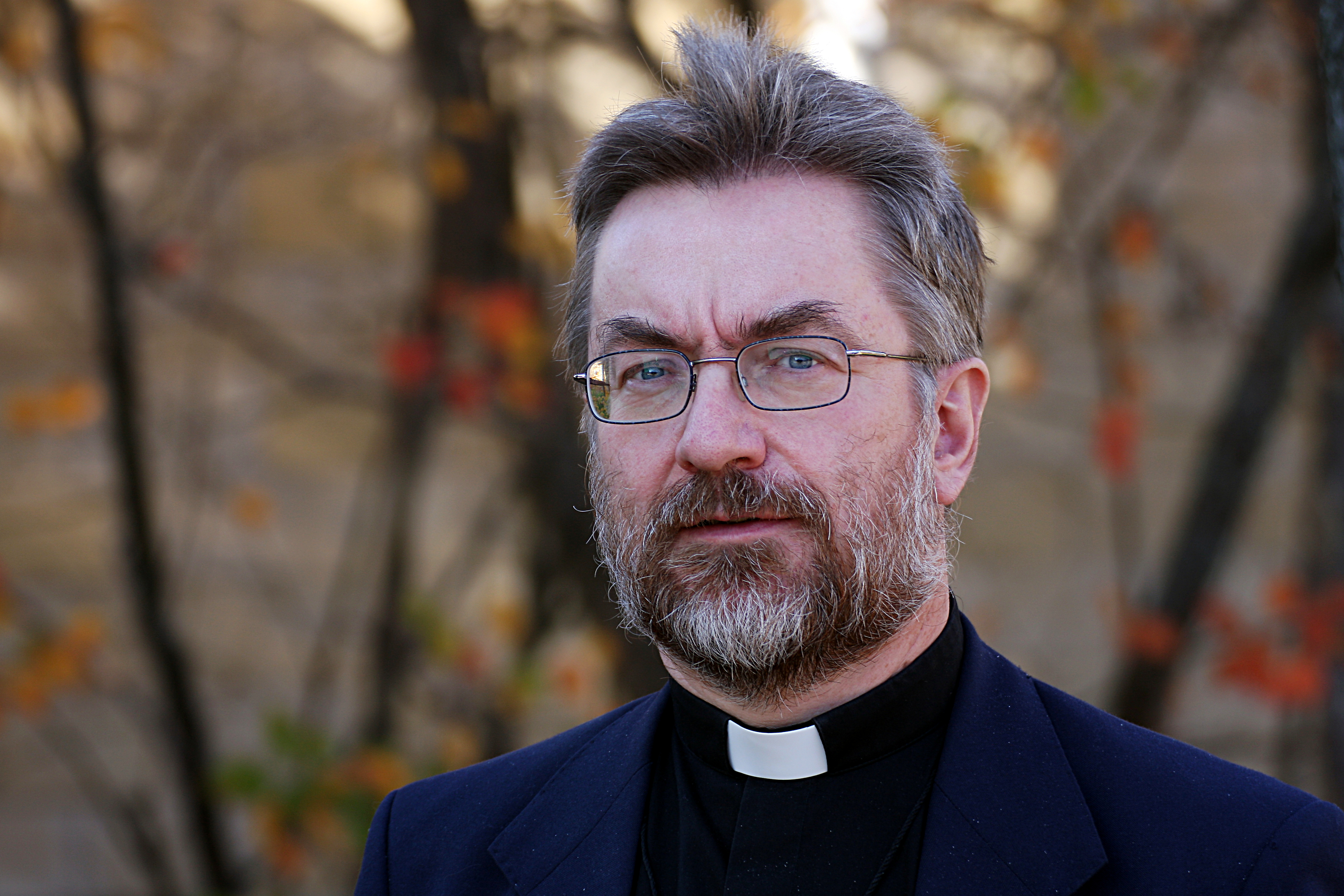 Leif Nordenstorm, präst, teolog och direktor för stiftelsen Fjellstedtska skolan i Uppsala.